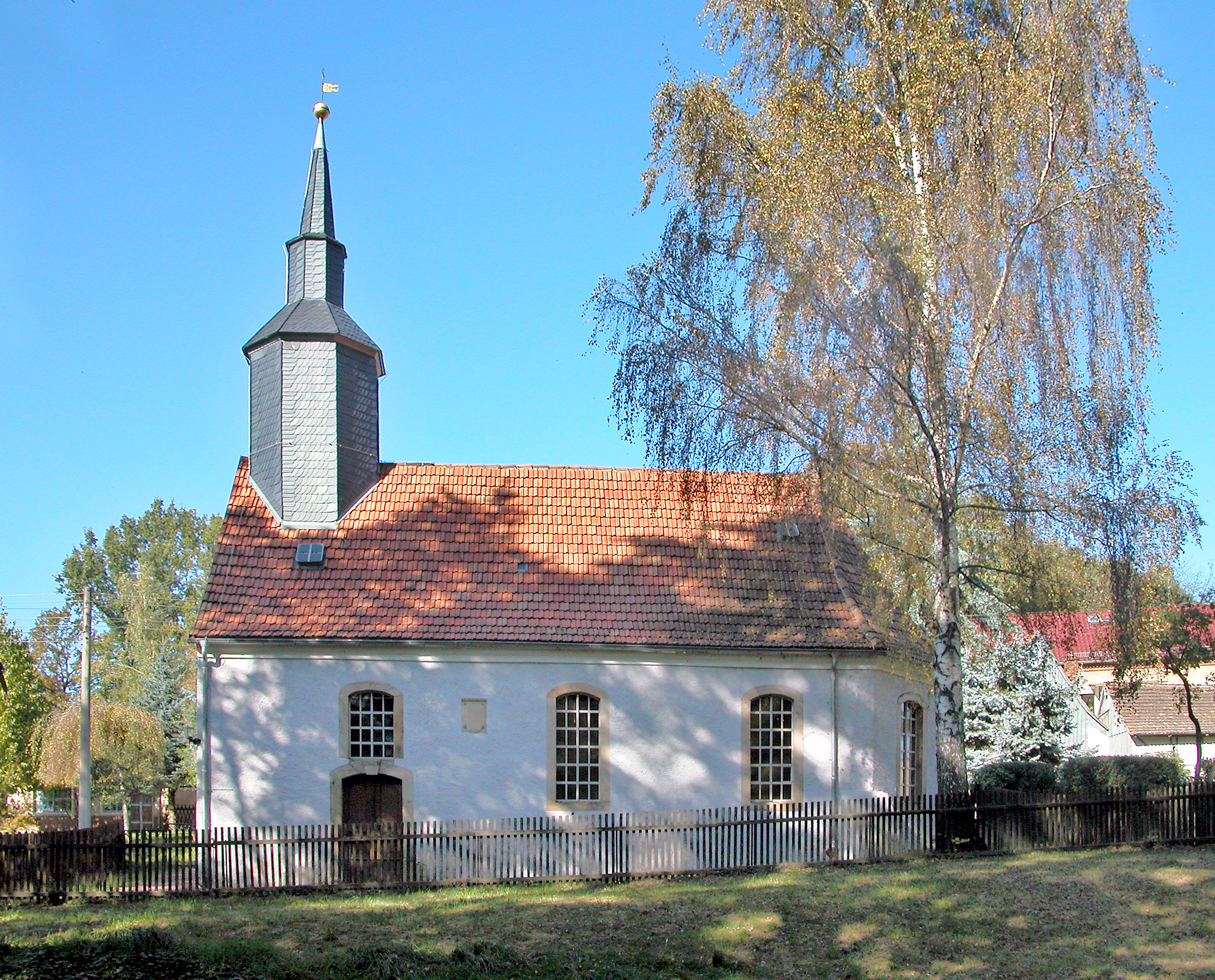 10.10.2010 01723 Helbigsdorf (Wilsdruff), Obere Dorfstraße 5 (GMP: 51.028718,13.473100): Dorfkirche. [DSCN42599.TIF]20101010205DR.JPG(c)Blobelt